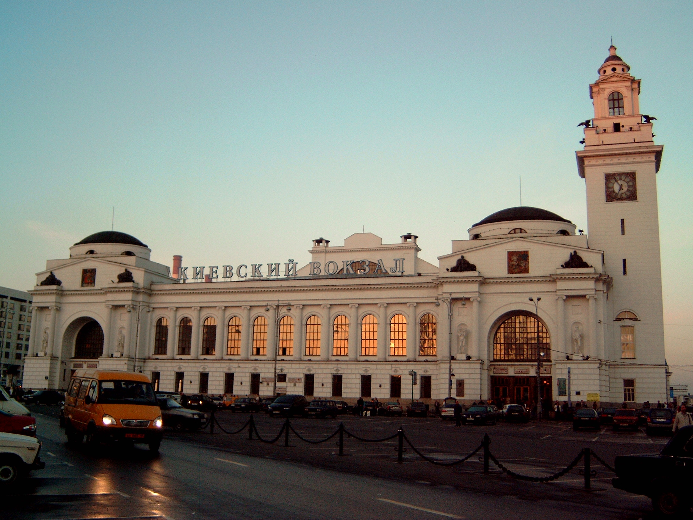 Kievski Rail Terminal, Moscow, selfmade picture